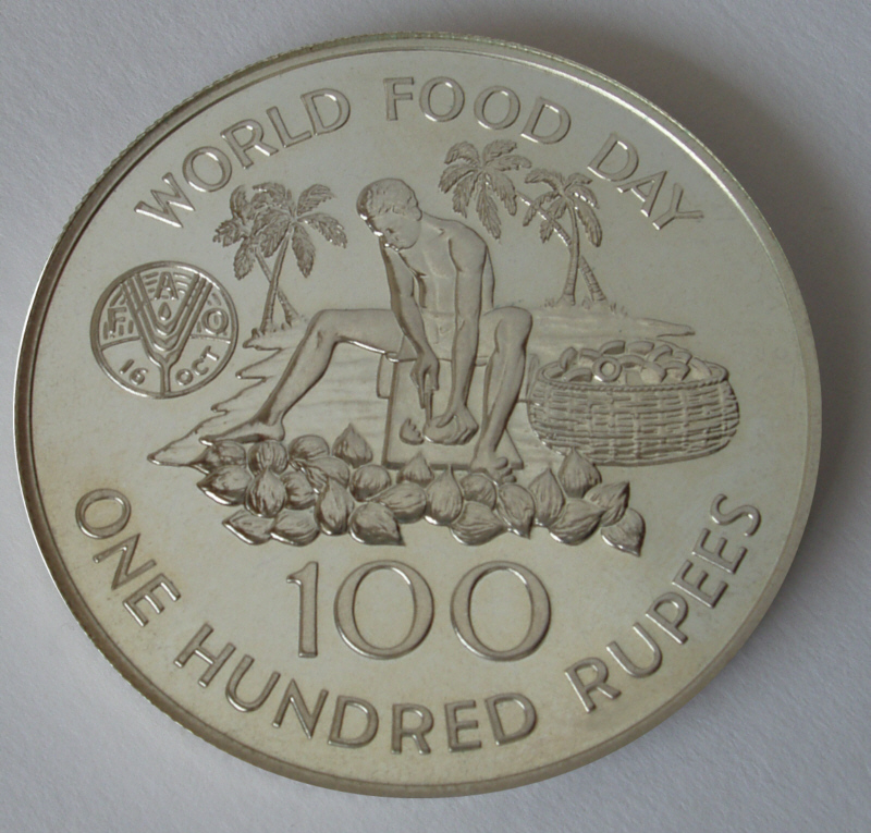 Seychelles, 100 Rupees, 1981, front, d=42 mm, 925/1000 silver